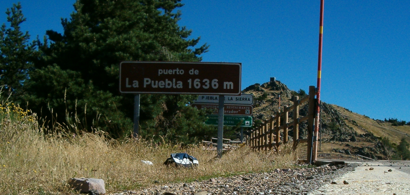 Puerto de la Puebla (1636 m) M-130